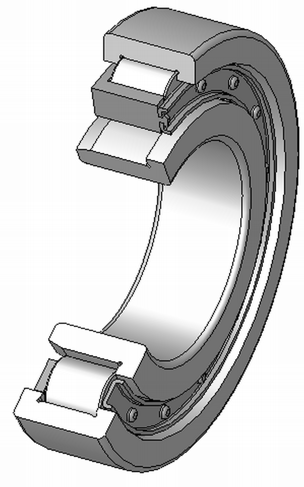 Zylinderrollenlager, Innenring mit einem Bord, Aussenring mit zwei Borden, Massivkäfig aus Stahl, zerlegbar, 120°Schnitt, Hinweis: Innenaufbau des Lagers (insbesondere des Kaefigs) variiert je nach Hersteller und Baugroesse rolling contact bearings